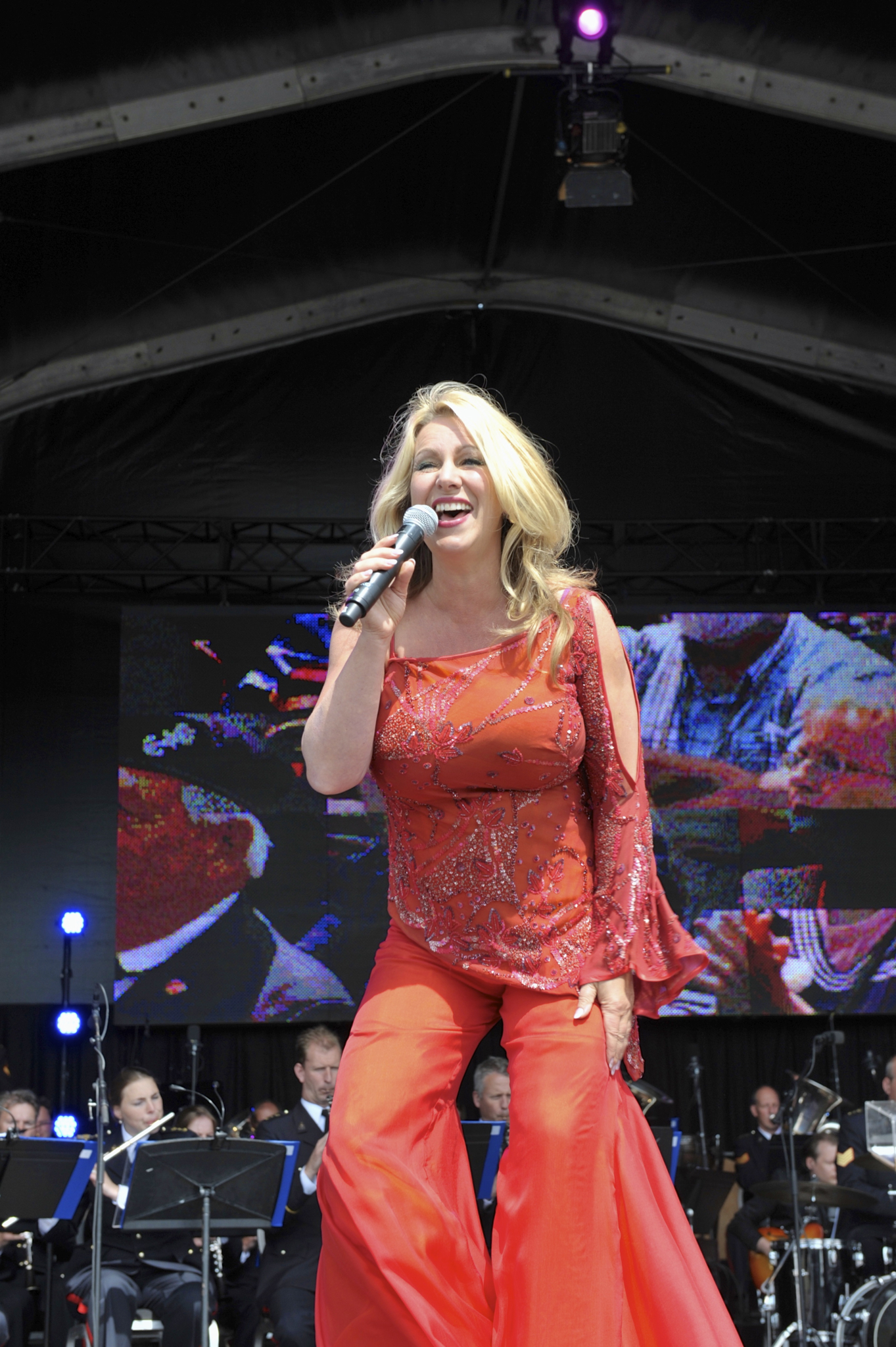 Begeleid door de Koninklijke Marinierskapel op Veteranendag 2013.